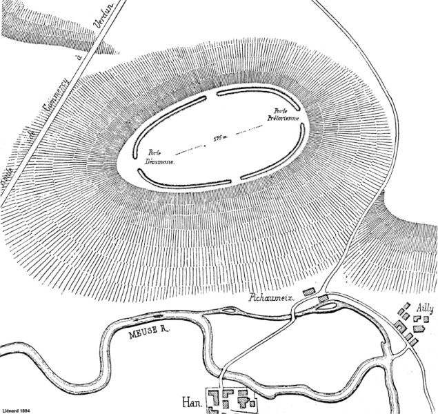 Le camp des Romains d'après Félix Liénard